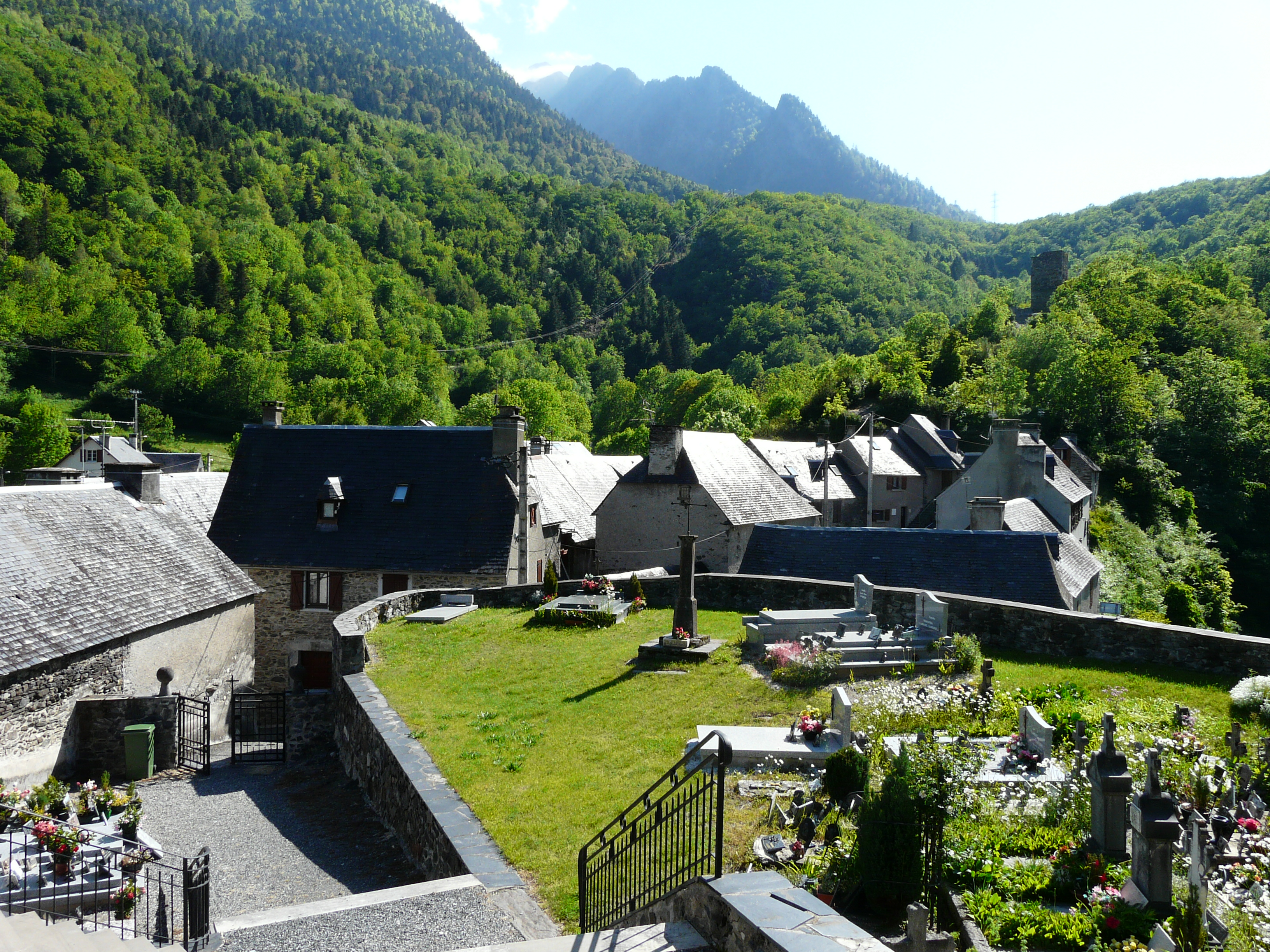 Le village de Tramezaïgues, Hautes-Pyrénées, France.